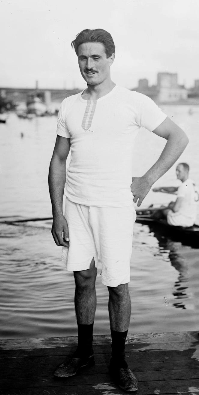 Dernière journée du Rowing-Club [de Paris, à Asnières-Courbevoie] (Giran), gagnant des skiffs seniors [aviron, 21 septembre 1919] : [photographie de presse] / [Agence Rol]